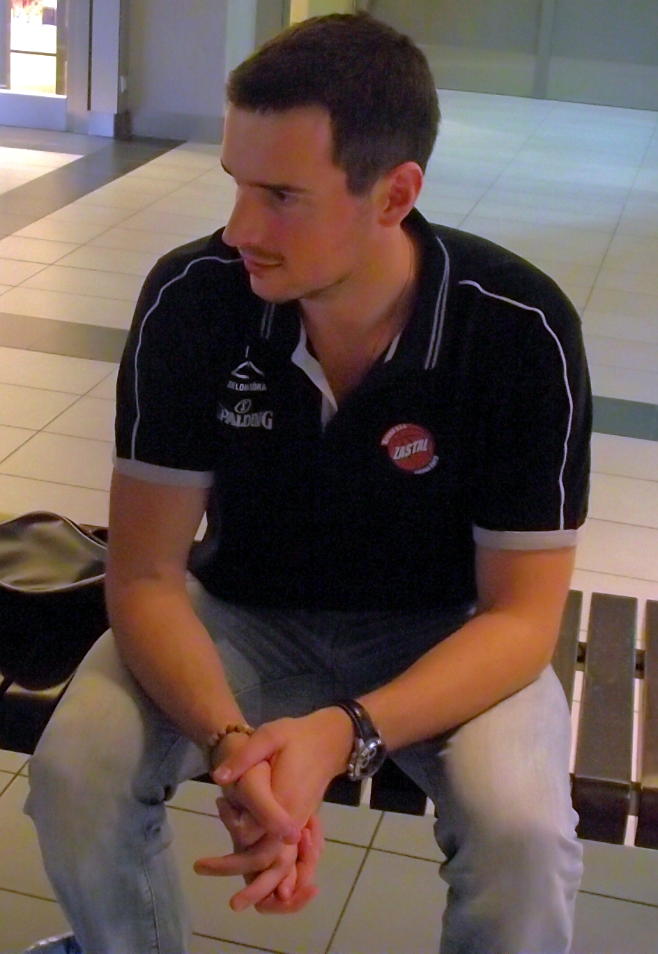 Uros Mirković podczas prezentacji Zastalu Zielona Góra przed sezonem 2011/2012.